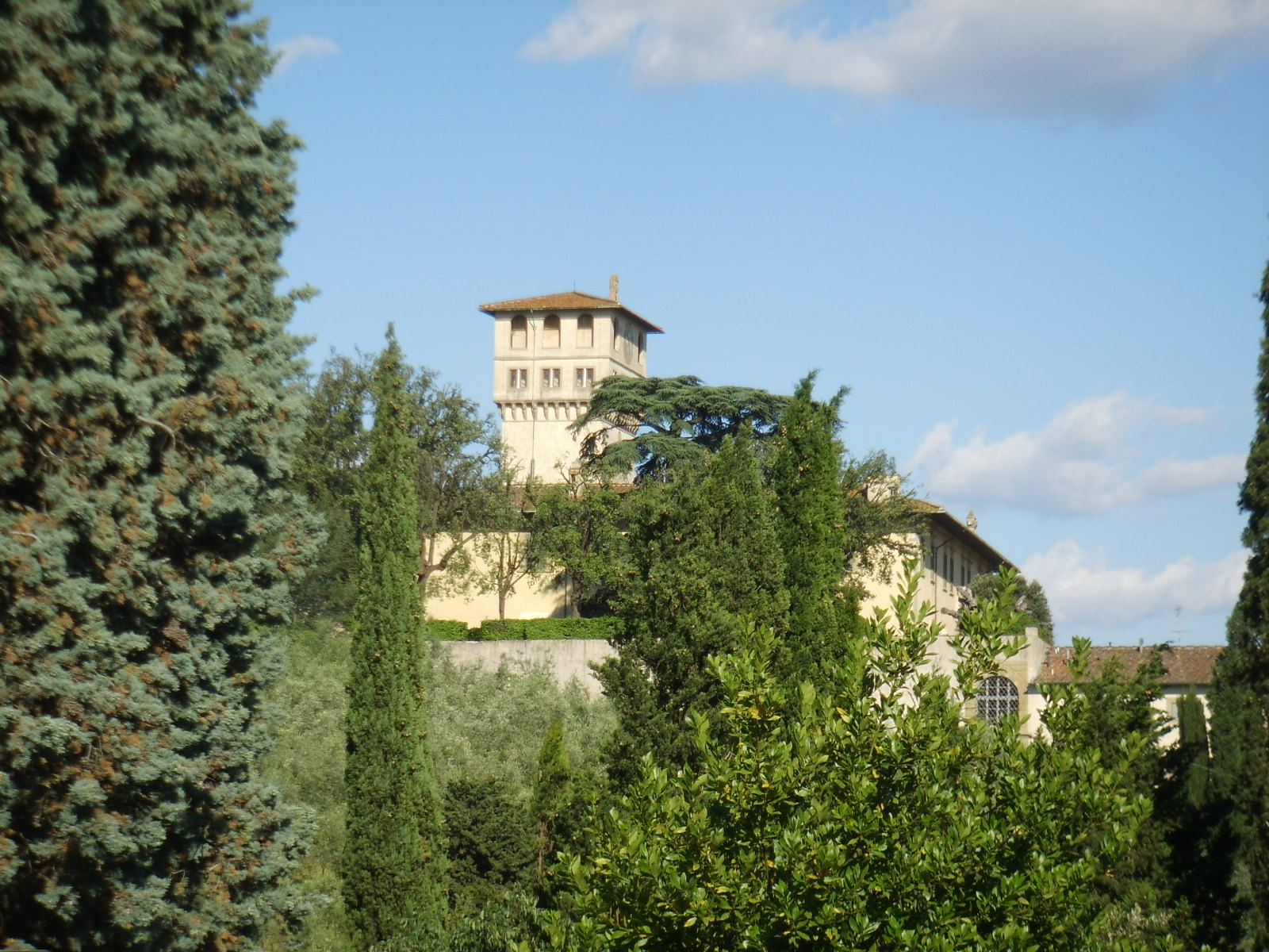 Villa La Petraia, Florence, Italy